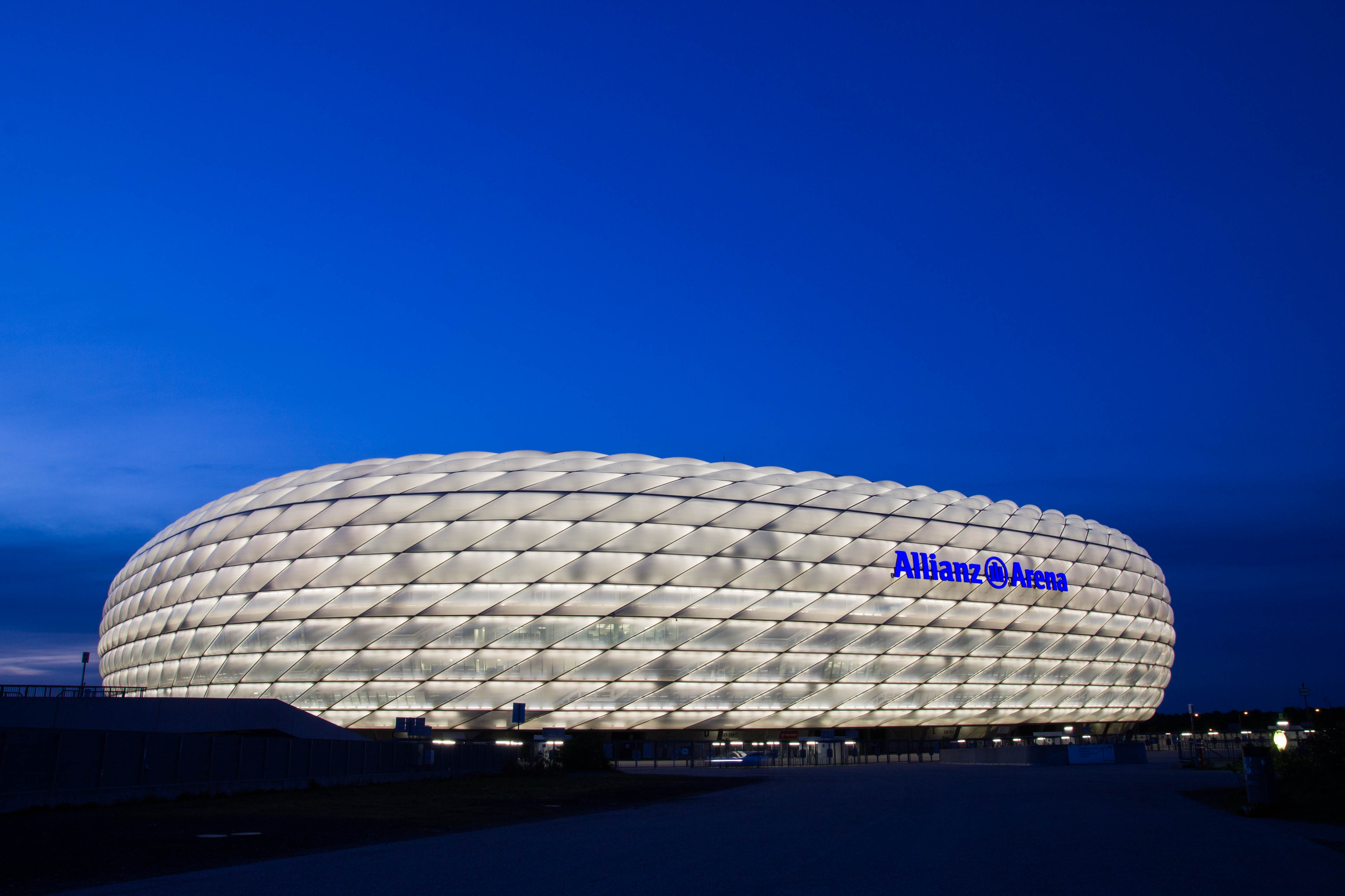 Allianz-Arena in weiß